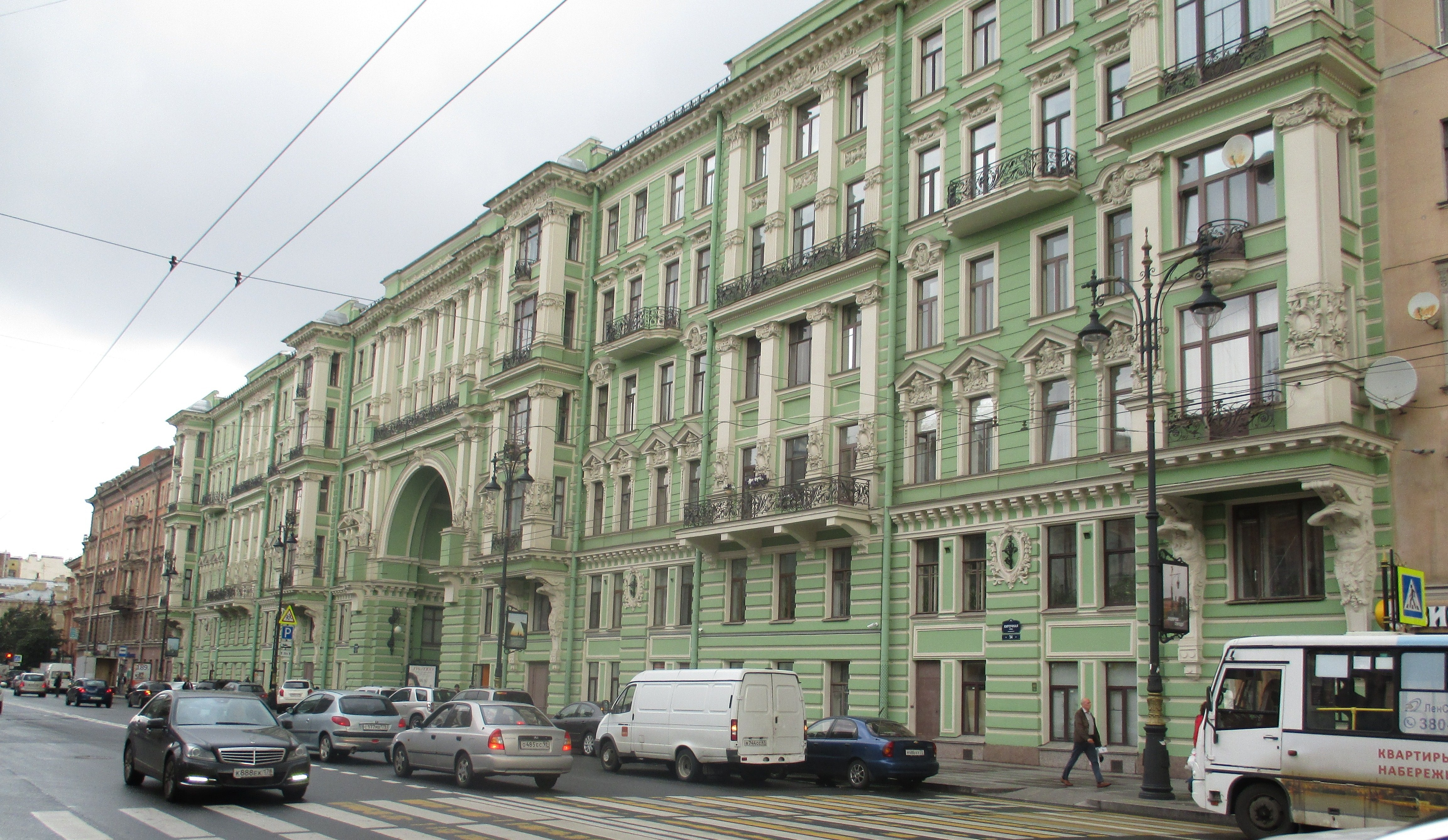 34 rue Kirotchnaïa à Saint-Pétersbourg.